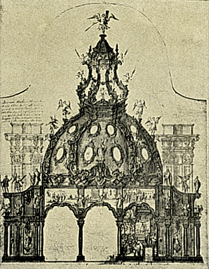 Sección del proyecto para la Santa Capilla de Nuestra Señora del Pilar de Zaragoza (España), 1725-1732.